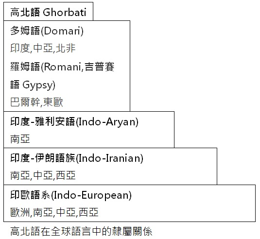 高北語在全球語言中隸屬關係